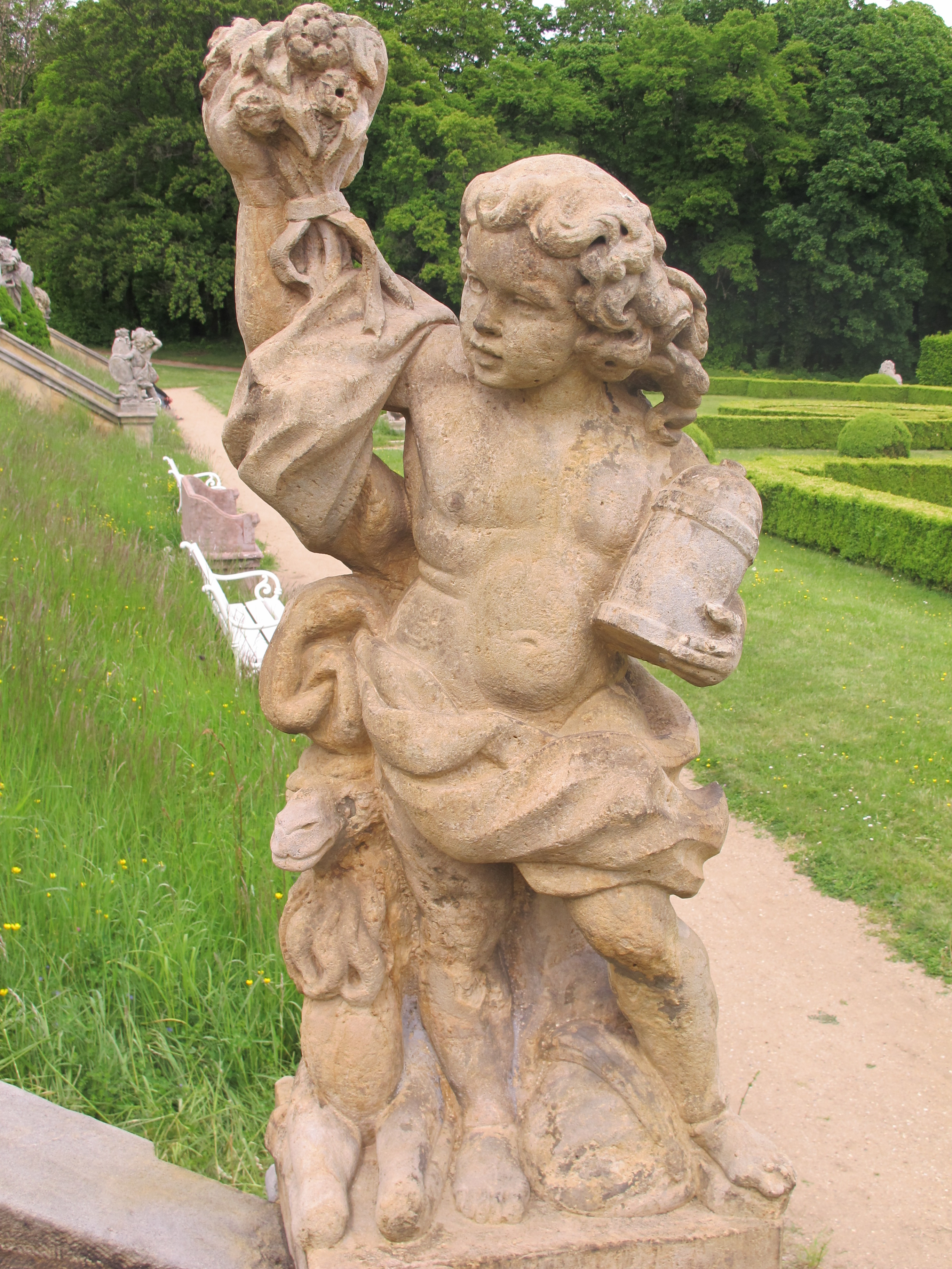 Alegorická socha Asie. Zámek Lysá nad Labem, Zámecká 1/21, Lysá nad Labem